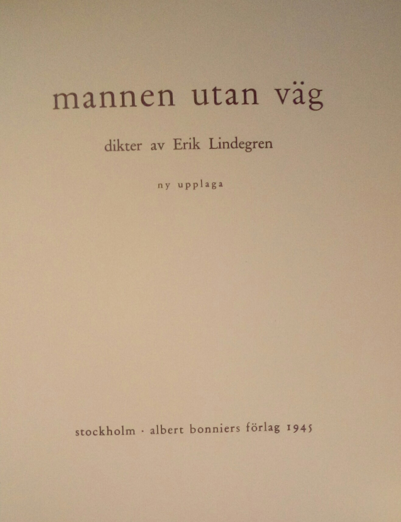 Titelsida Erik Lindegren mannen utan väg 1945.